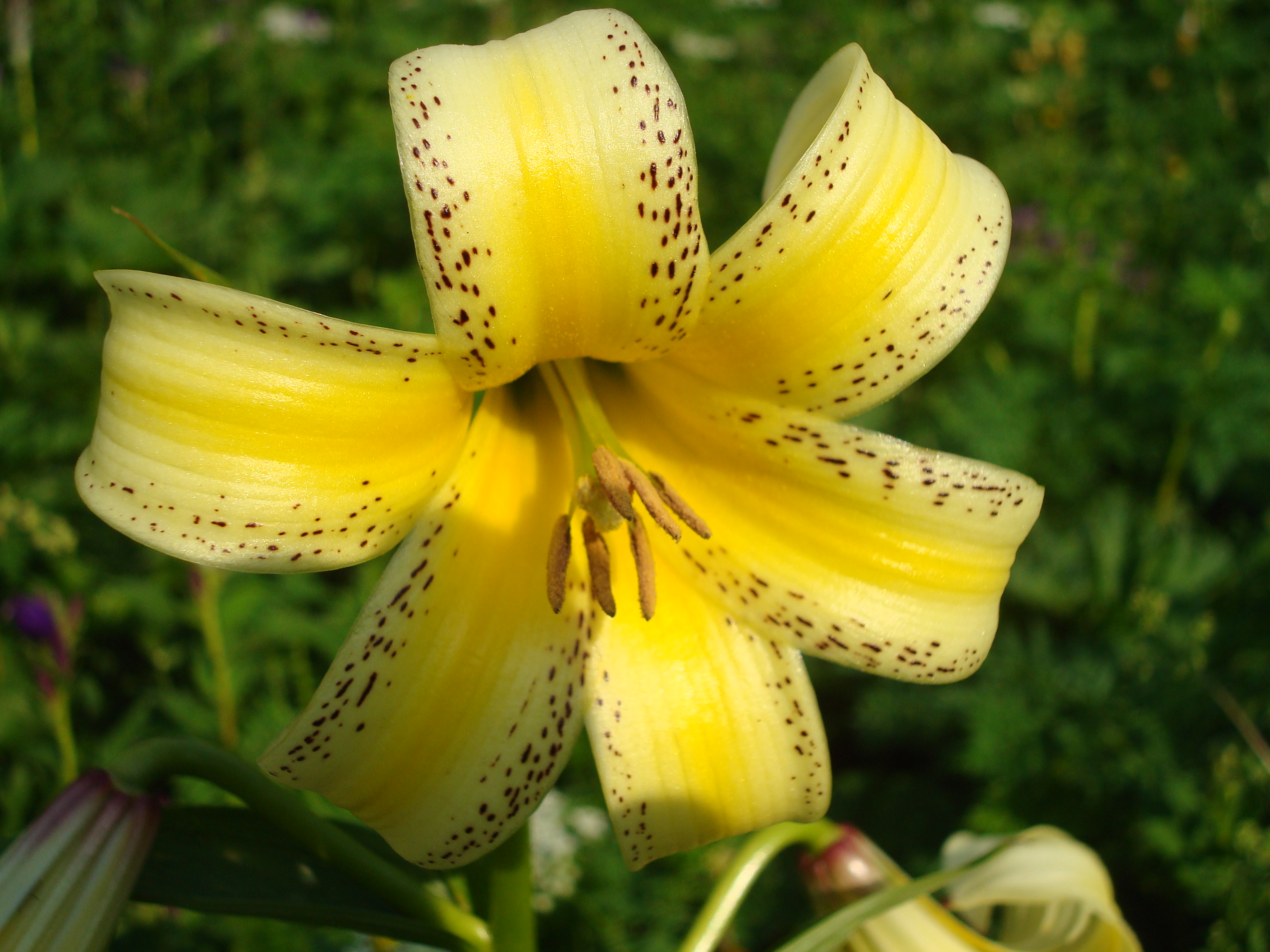 Лилия Кессельринга. Дикорастущее растение Кавказского государственного природного биосферного заповедника. Занесено в Красную книгу. Снимок сделан в Западном отделе заповедника в районе горы Фишт. This image is related to the protected area of Russia number 2300002